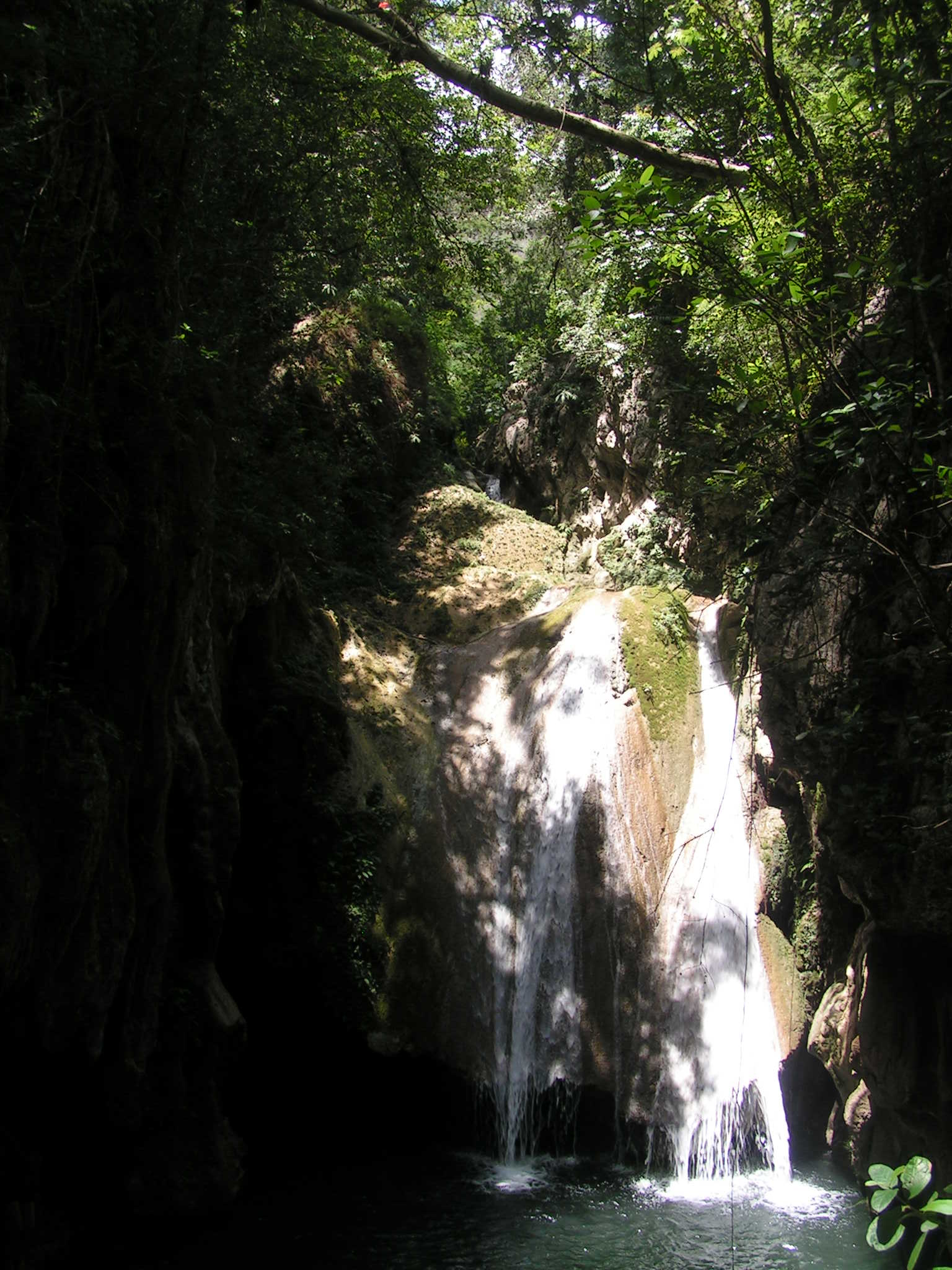 Cascade aux environs de Trinidad, Cuba.